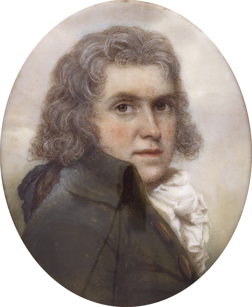 Self-portrait